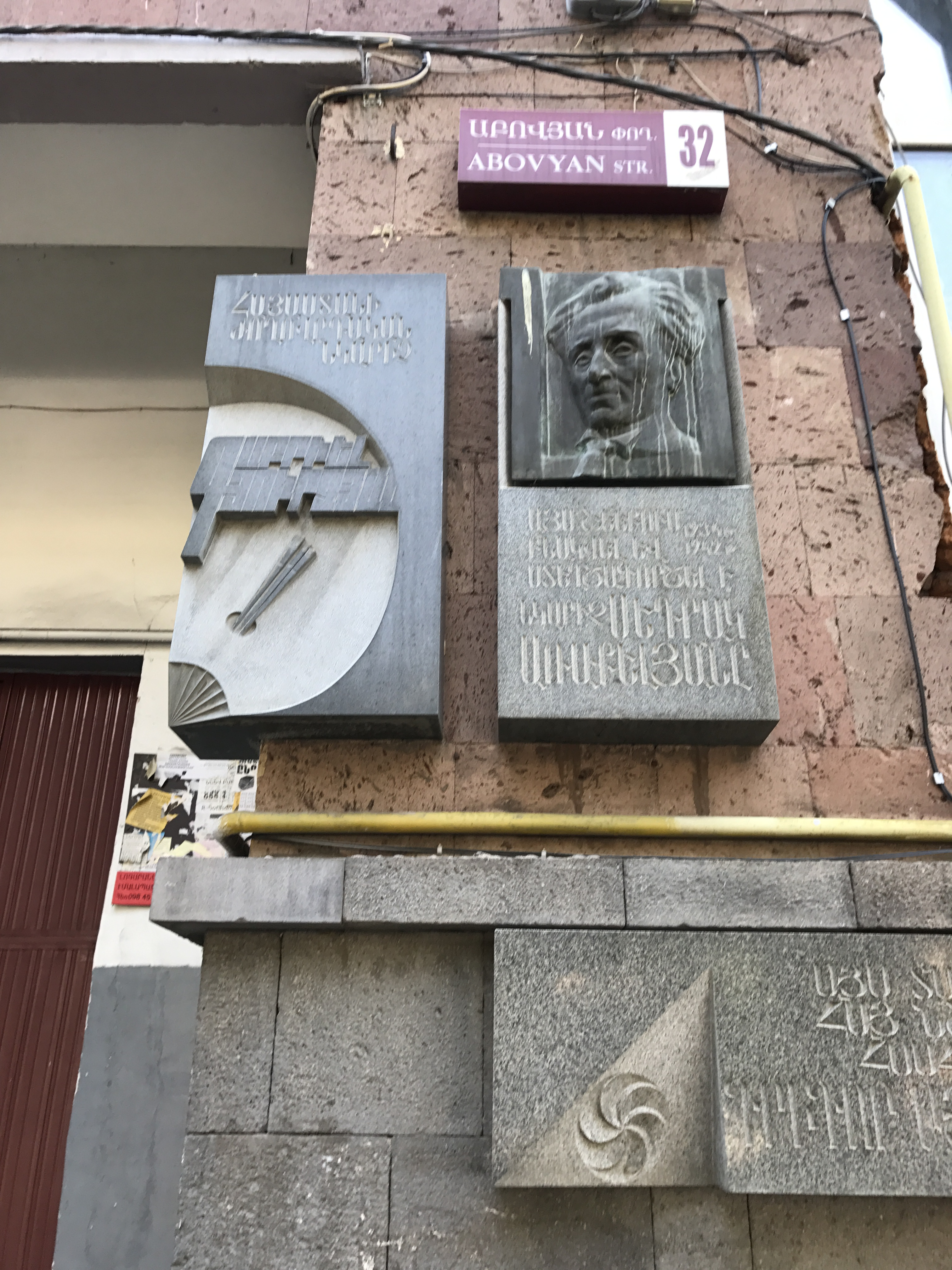 Image d'Arménie en juillet 2017.